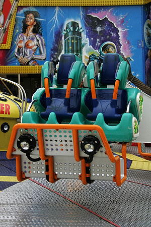 Basler Herbstmesse 2005: Booster (Messeplatz)